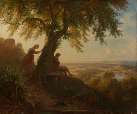 Aus Goethes Hermann und Dorothea (Hermann wird von seiner Mutter belauscht), Öl auf Leinwand, 67,4 x 80,6 cm. Bayerische Staatsgemäldesammlungen, Sammlung Schack, München